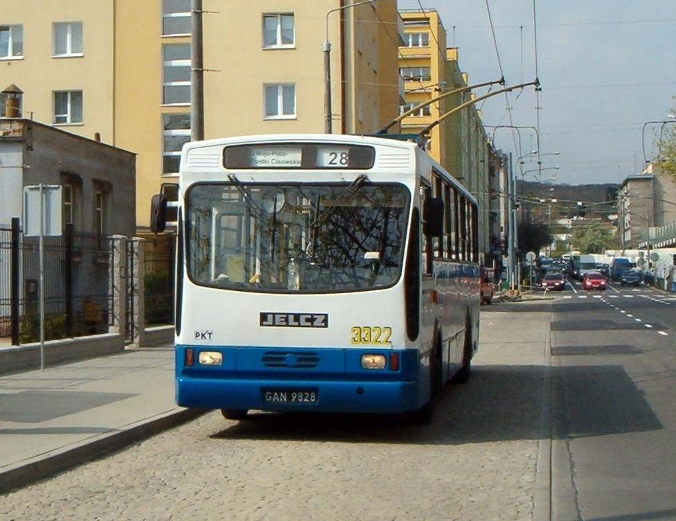 Trolejbus Jelcz 120MTE z 1994 roku.